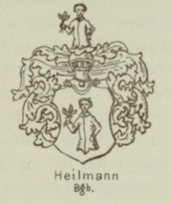 Armoiries (blason) du Bourgmestre de Mulhouse, Heilmann